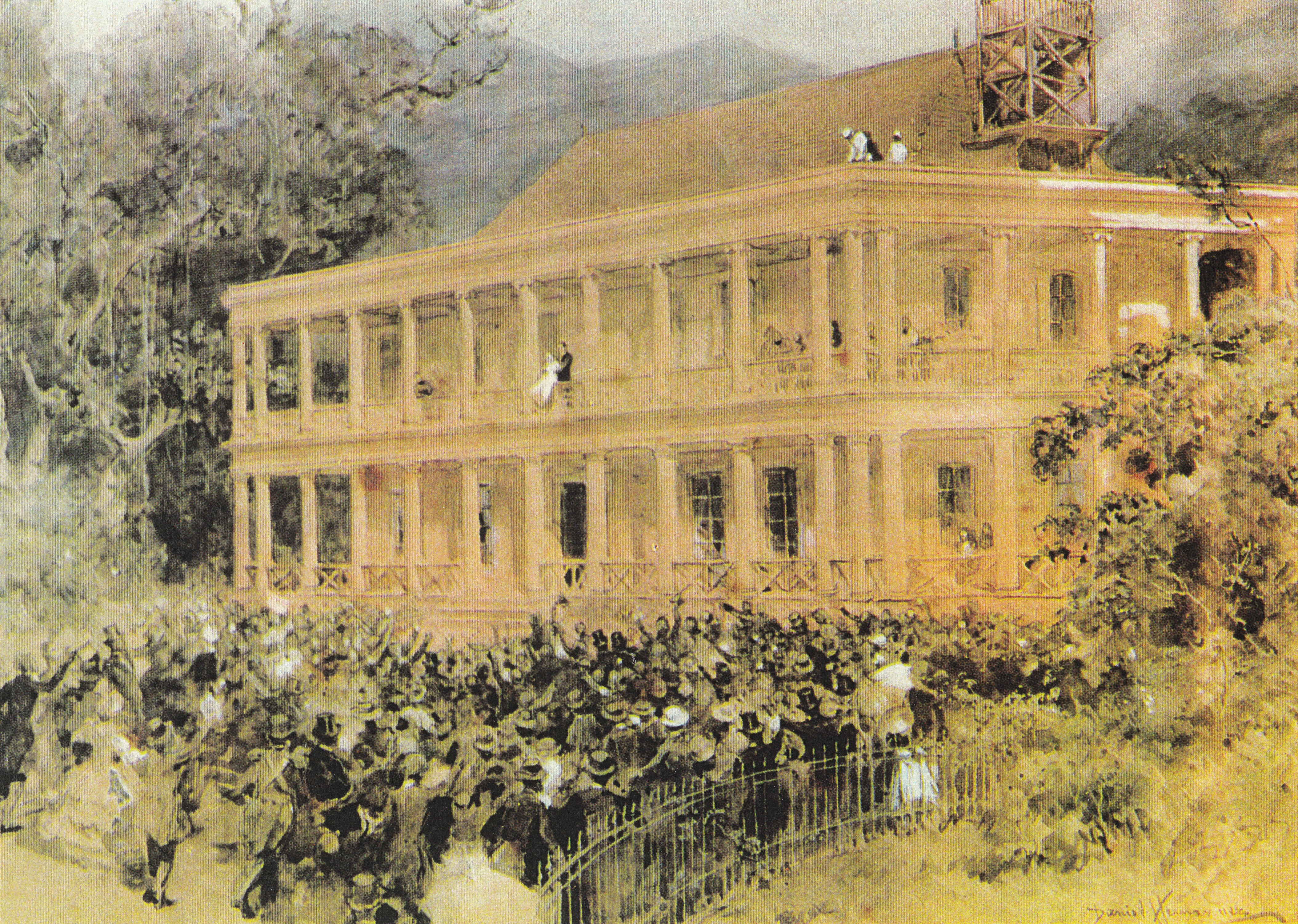 Maison d'Adrien d'Épinay à Port-Louis, Ile Maurice. Le 22 juillet 1832, une foule envahit sa demeure, l'acclame au balcon et demande à ce que sa dernière fille, dans ses bras, porte le nom de "Mauricia".